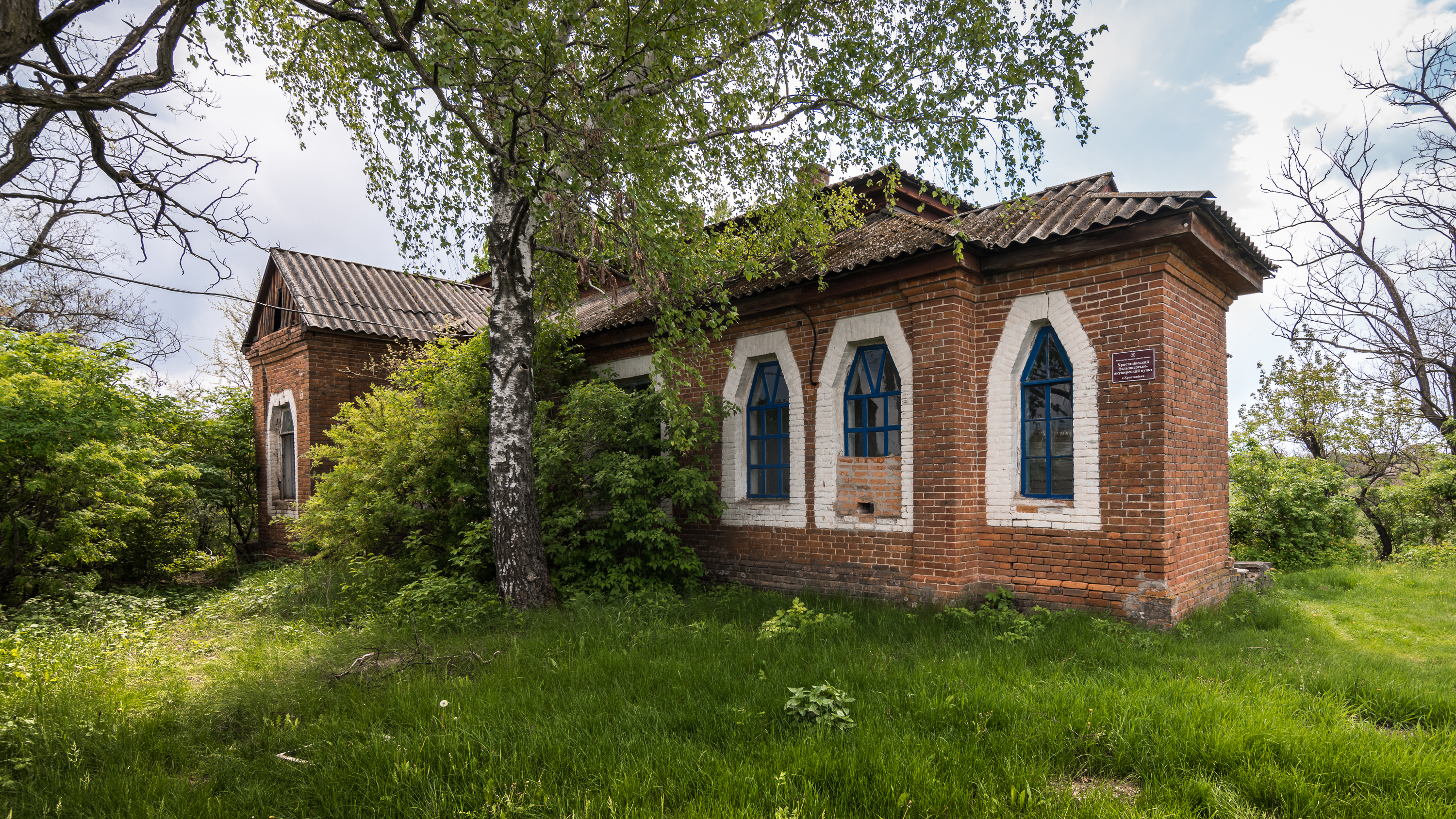 Земська школа в селі Христанівка. Зведена в 1913 році за проектом архітектора Опанаса Георгійовича Сластіона. Є однією з багатьох збережених шкіл Лохвицького земства.